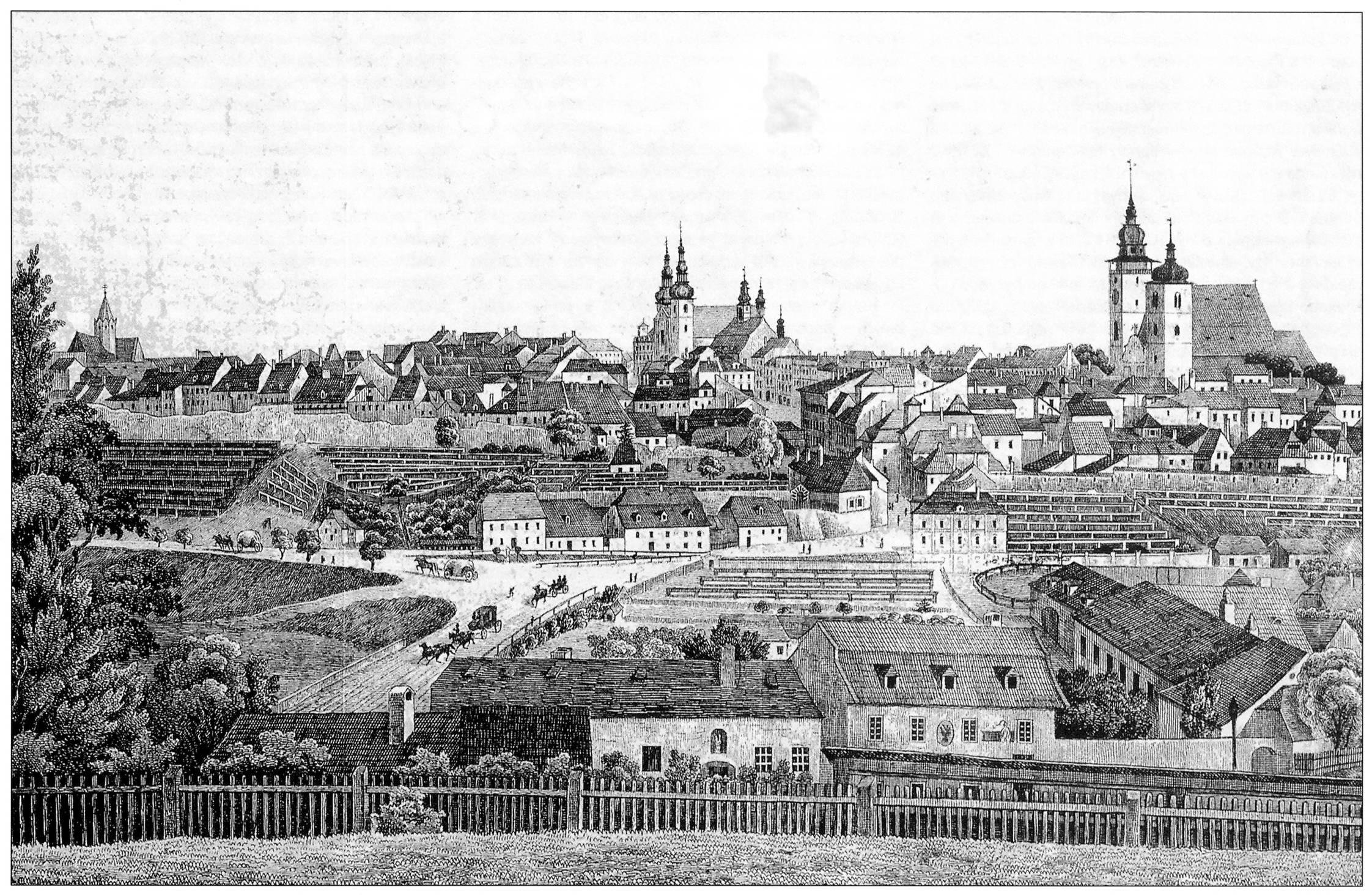 Pohled na Jihlavu od jihu 1849, litografie.